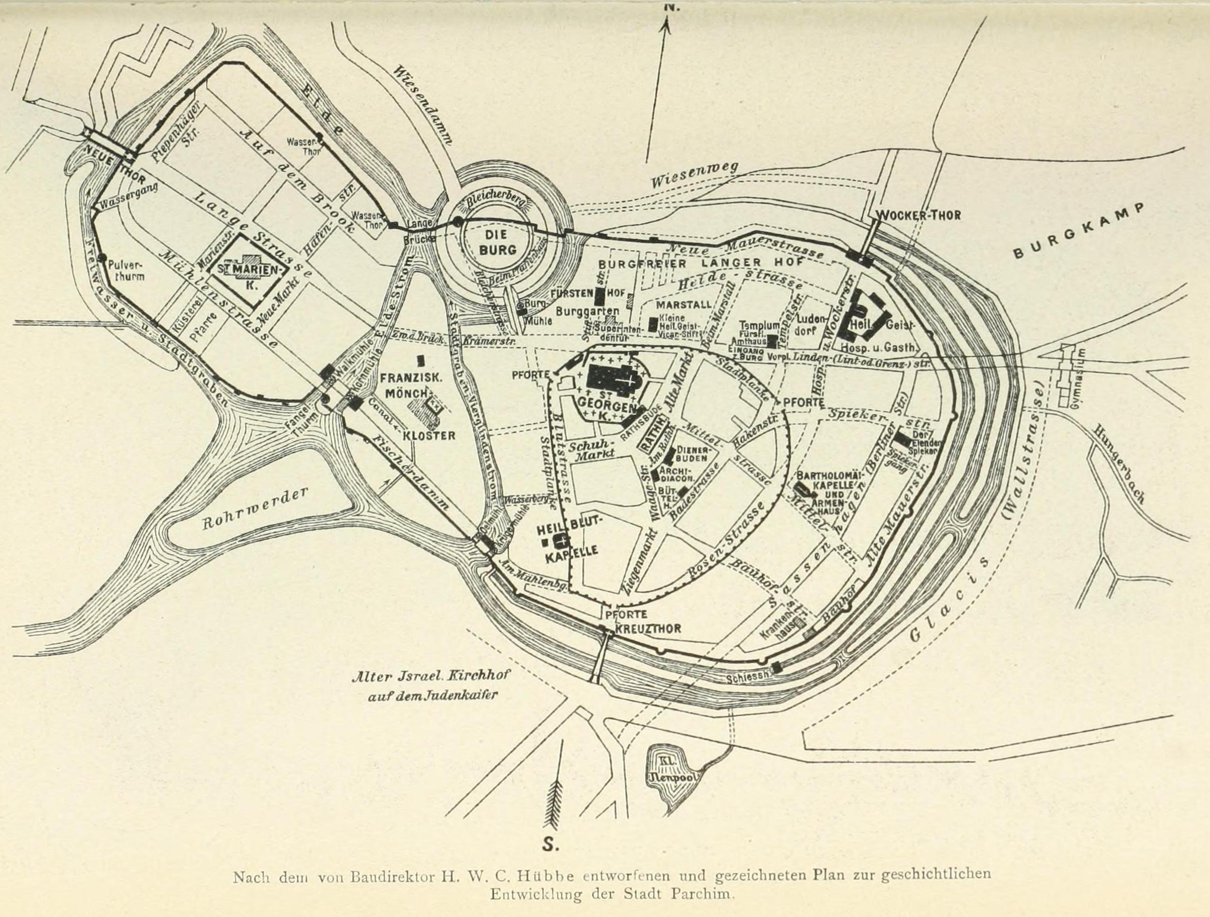 Rekonstruierte Planzeichnung der Stadt Parchim im Mittelalter